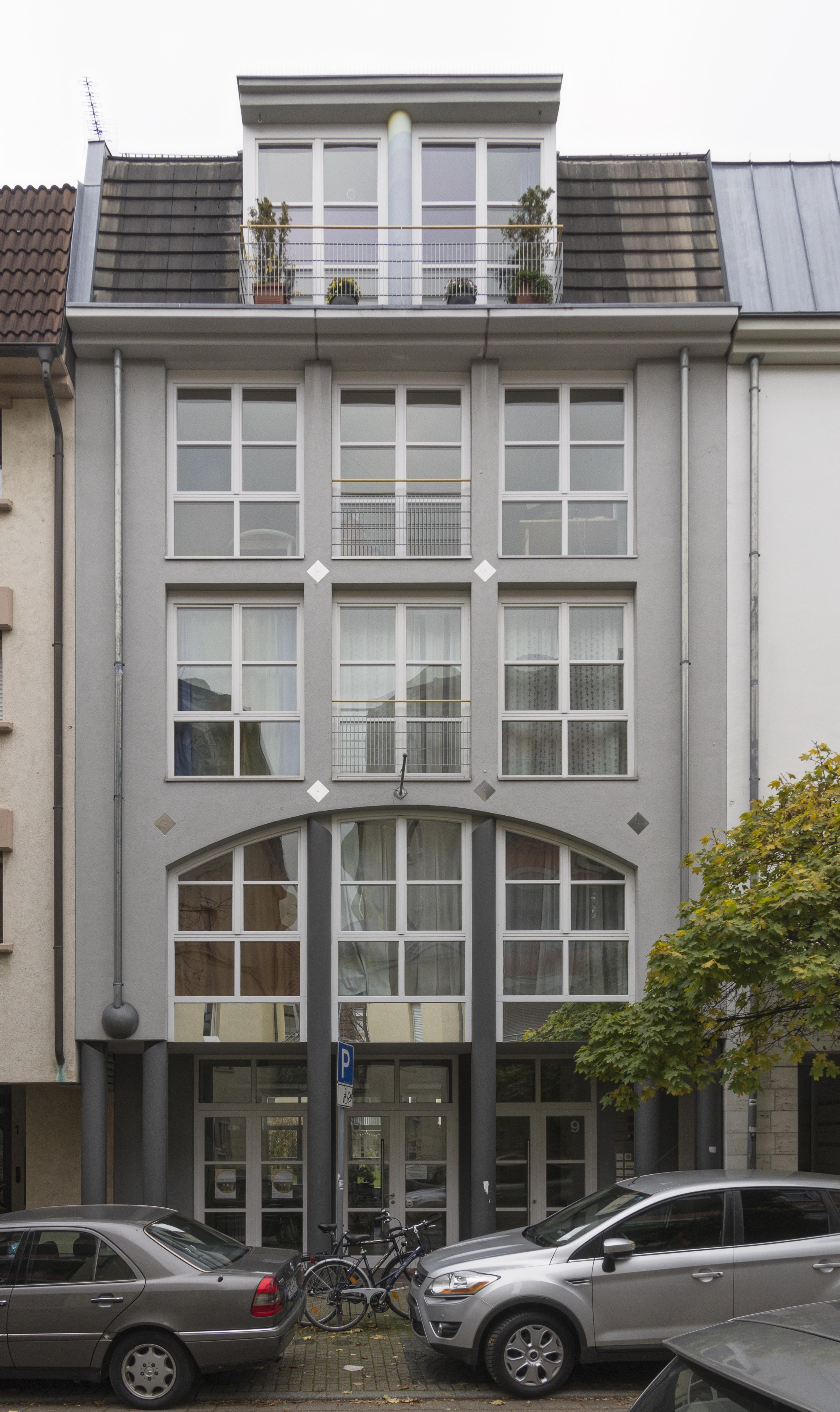 Gebäude in Freiburg im Breisgau